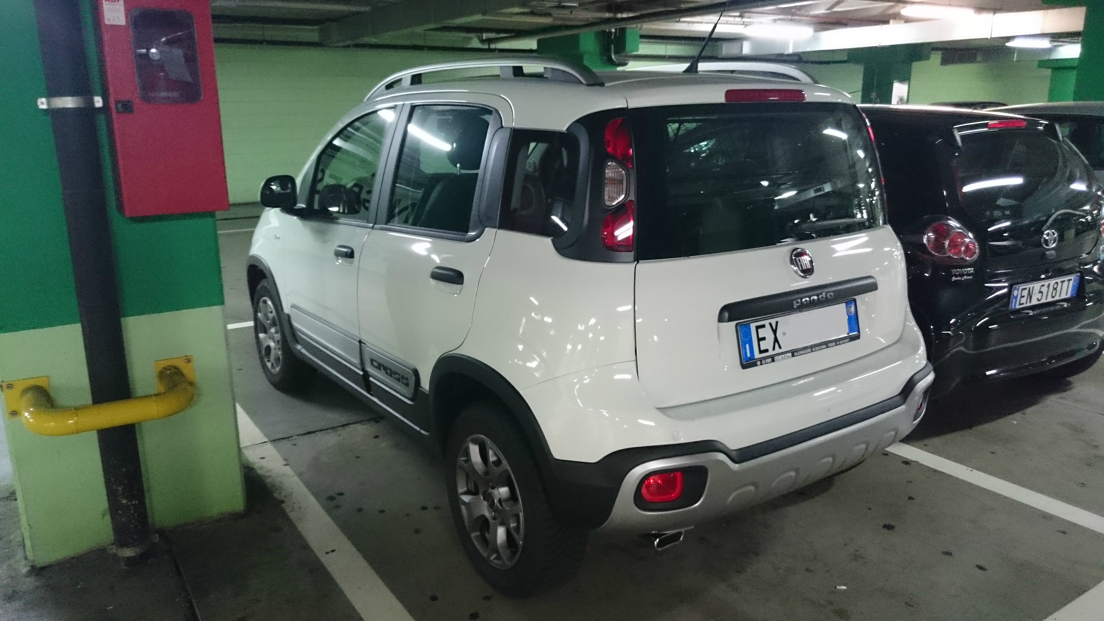 Una Fiat Panda Cross 4x4 a Milano